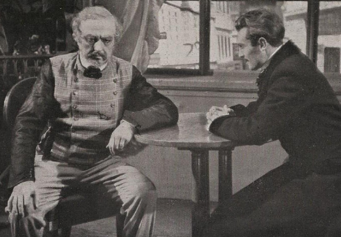 Josef Rozsíval (1884-1941), český herec